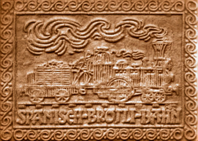 Hunneg-Tirggel aus dem Kanton Zürich (8x11 cm).